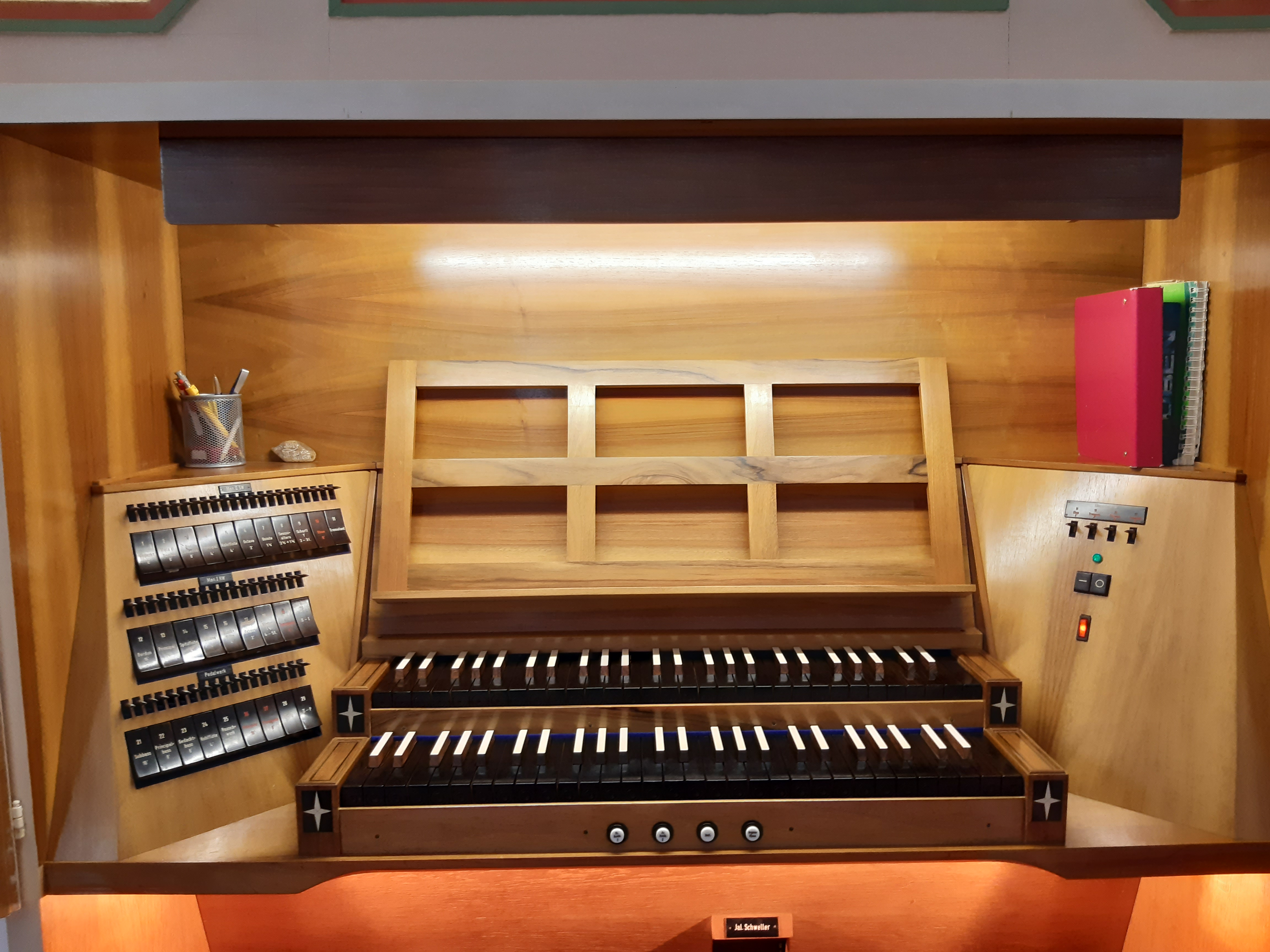 Der Zweimanualige Spieltisch der Orgel. Die Registertraktur ist Elektrisch (Schleifladen) Die Spieltraktur ist Mechanisch